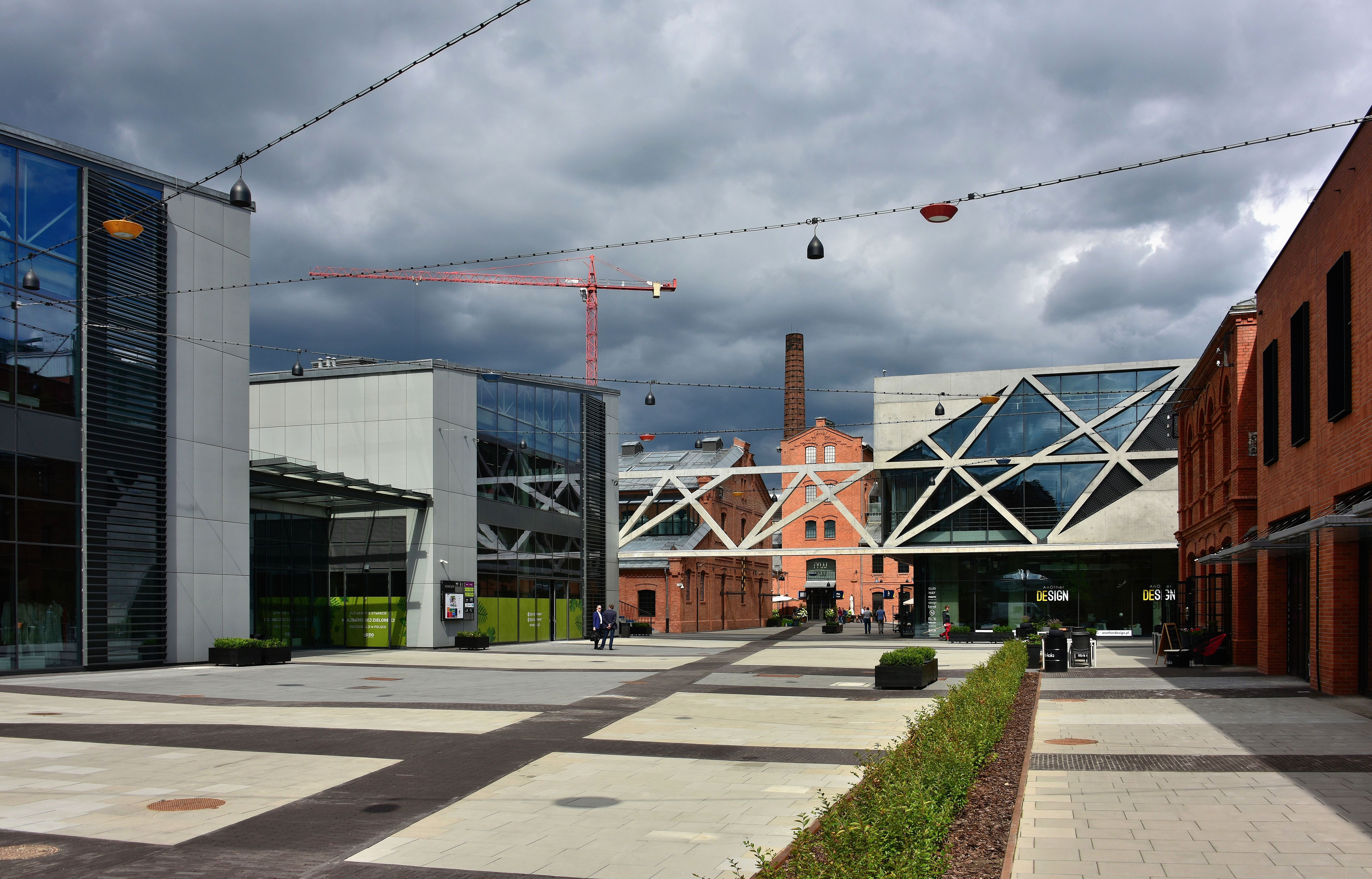 Centrum Praskie Koneser w Warszawie